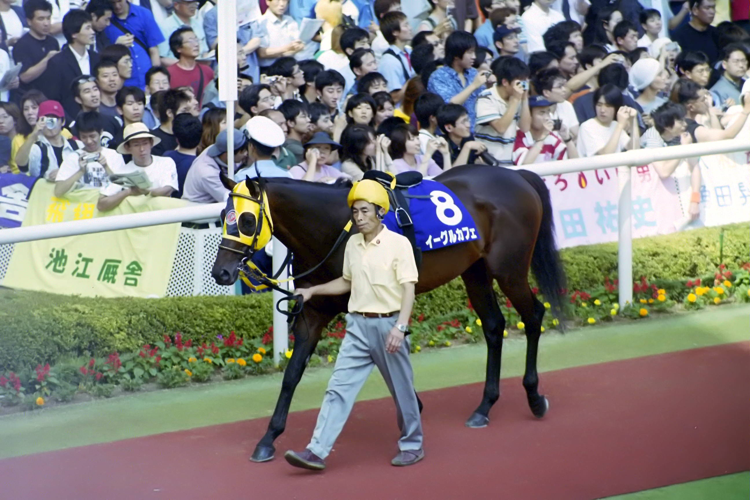 イーグルカフェ 2003年宝塚記念